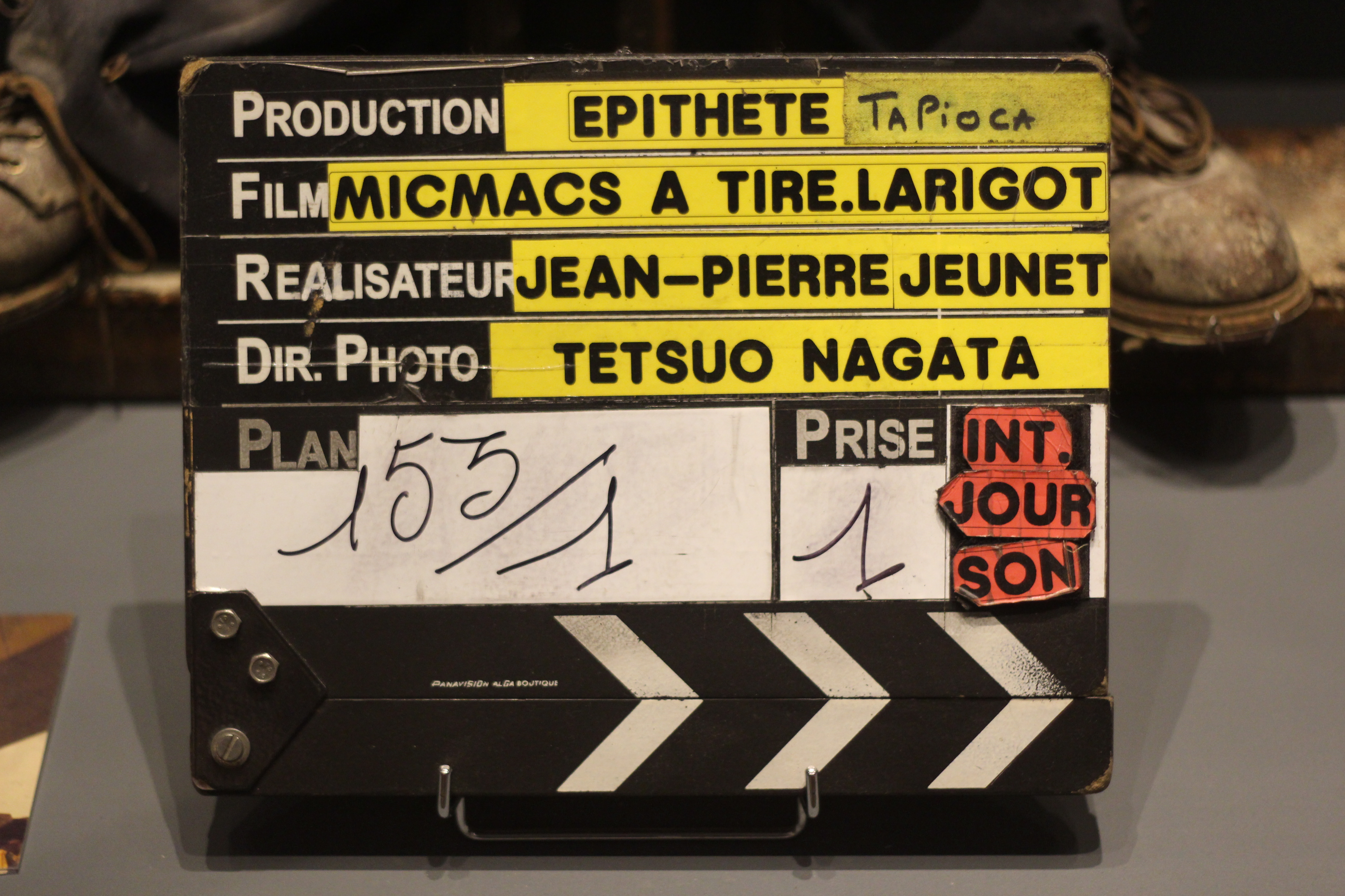 Clap du film Micmacs à tire-larigot. Exposition "Caro/Jeunet" au musée Minature et Cinéma en 2018-2019.